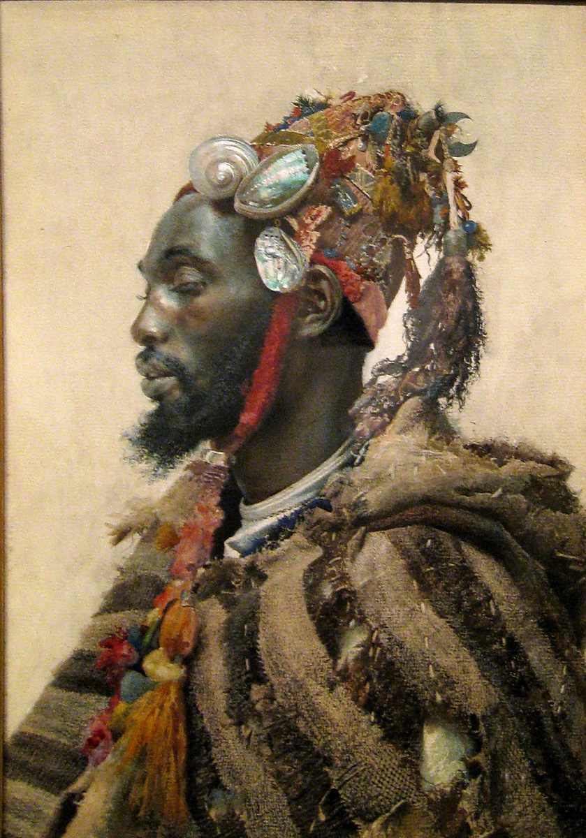 Retrat del santó Darcagüey. Aquarela de Josep Tapiró (1890)